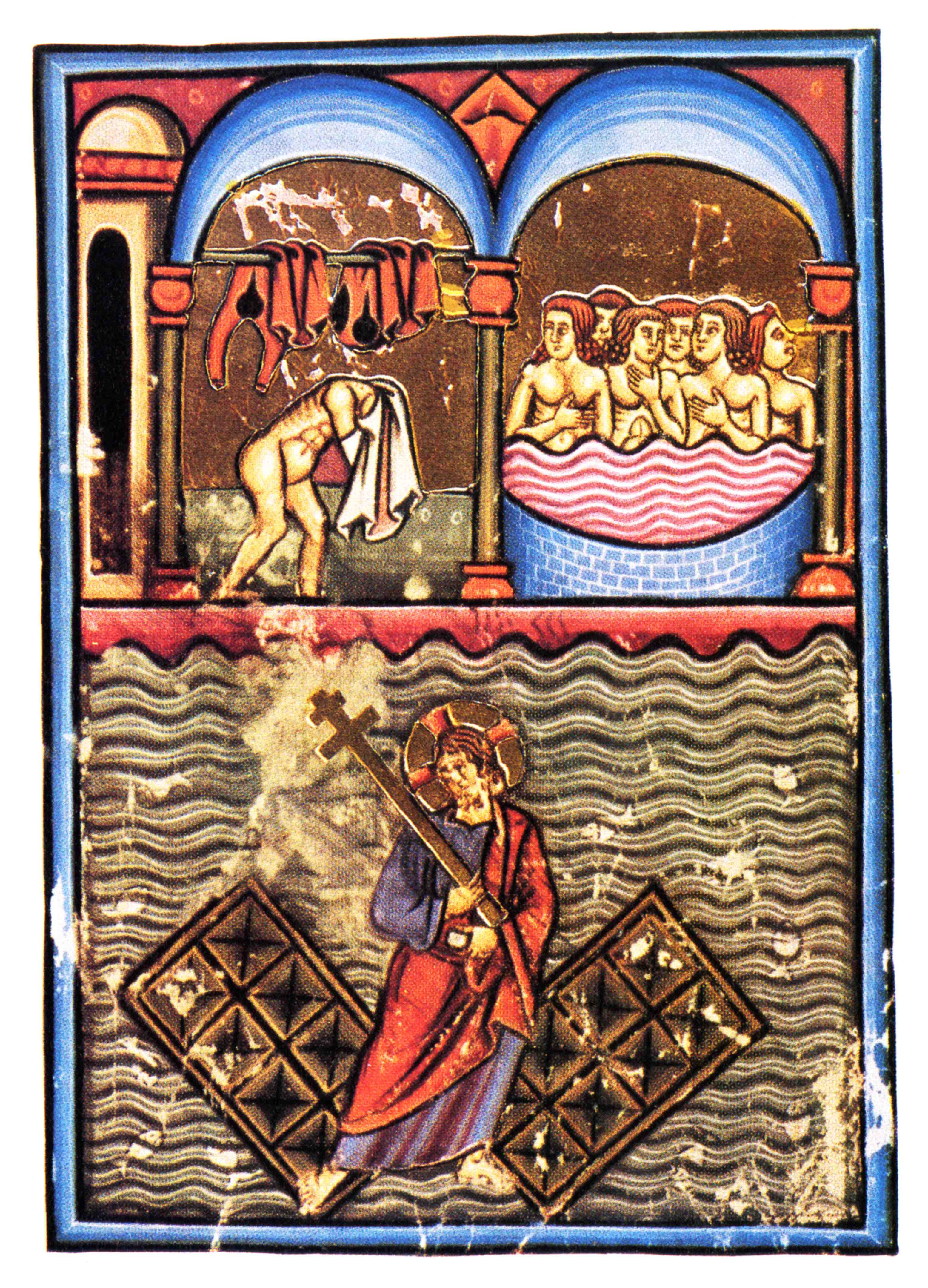 Pietro da Eboli (XIII secolo) "De Balneis Puteolanis". Miniatura del Codice Angelico Ms. 1474 (Biblioteca Angelica di Roma), che mostra il "Balneum Tripergulae", nel medioevo indicato per tutti coloro che si sentivano debilitati, per chi accusava disturbi allo stomaco o alla mente. Vien detto consistere in due stanze in una delle quali ci si spoglia mentre nell'altra ci si cura. Poiché il bagno si trovava vicino al Lago d'Averno ritenuto dagli antichi l'ingresso agli inferi, la miniatura mostra anche Gesù Cristo che, dopo esser morto, discese nel soggiorno dei morti per tre giorni, per infrangere le porte dell'Ade, prima di risorgere. Il Balneum Tripergulae (il cui nome deriva dal vicino villaggio di Tripergola), è stato irrimediabilmente distrutto o sepolto dall'eruzione del Monte Nuovo avvenuta il 29 settembre 1538.